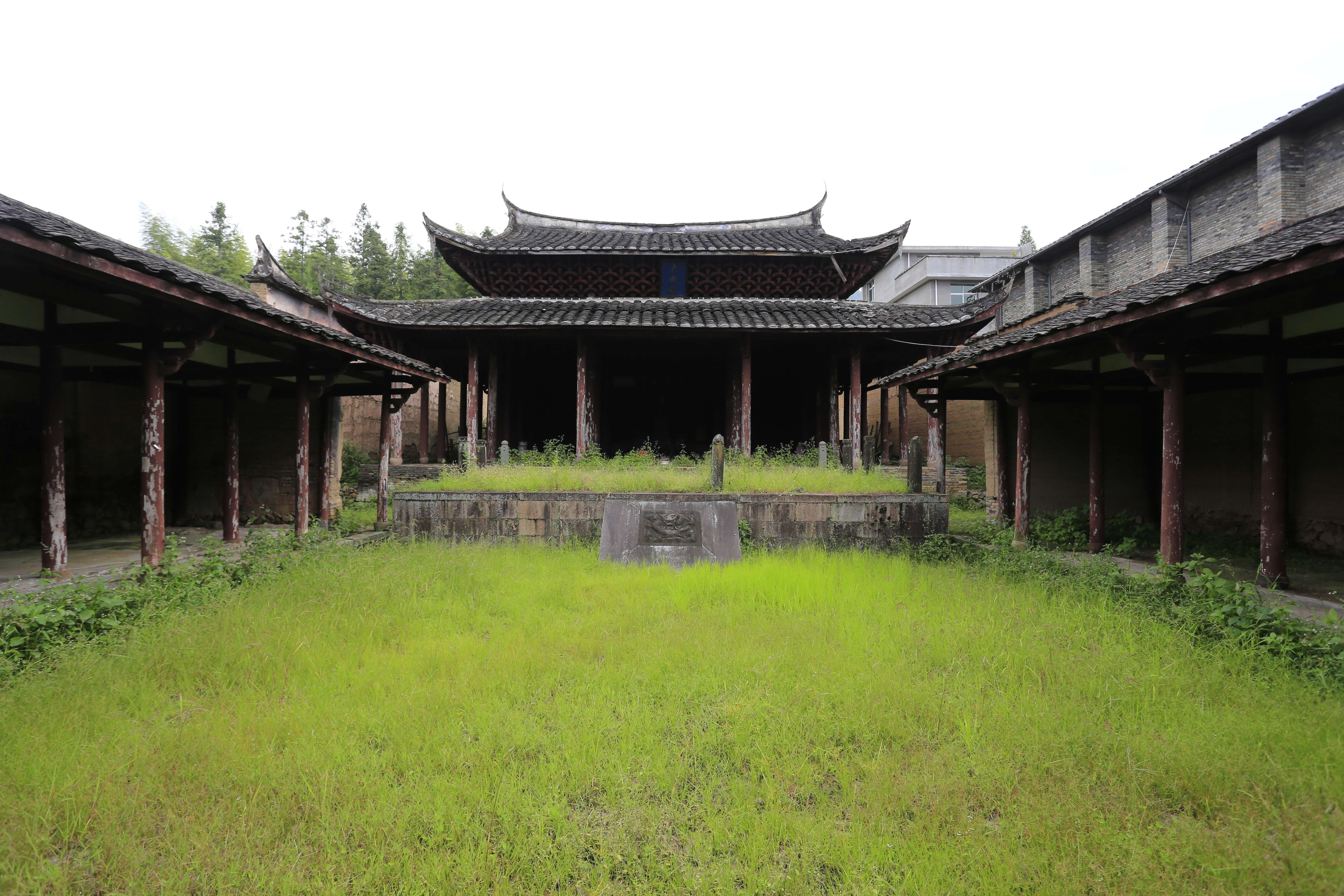 屏南文庙—— 大成殿